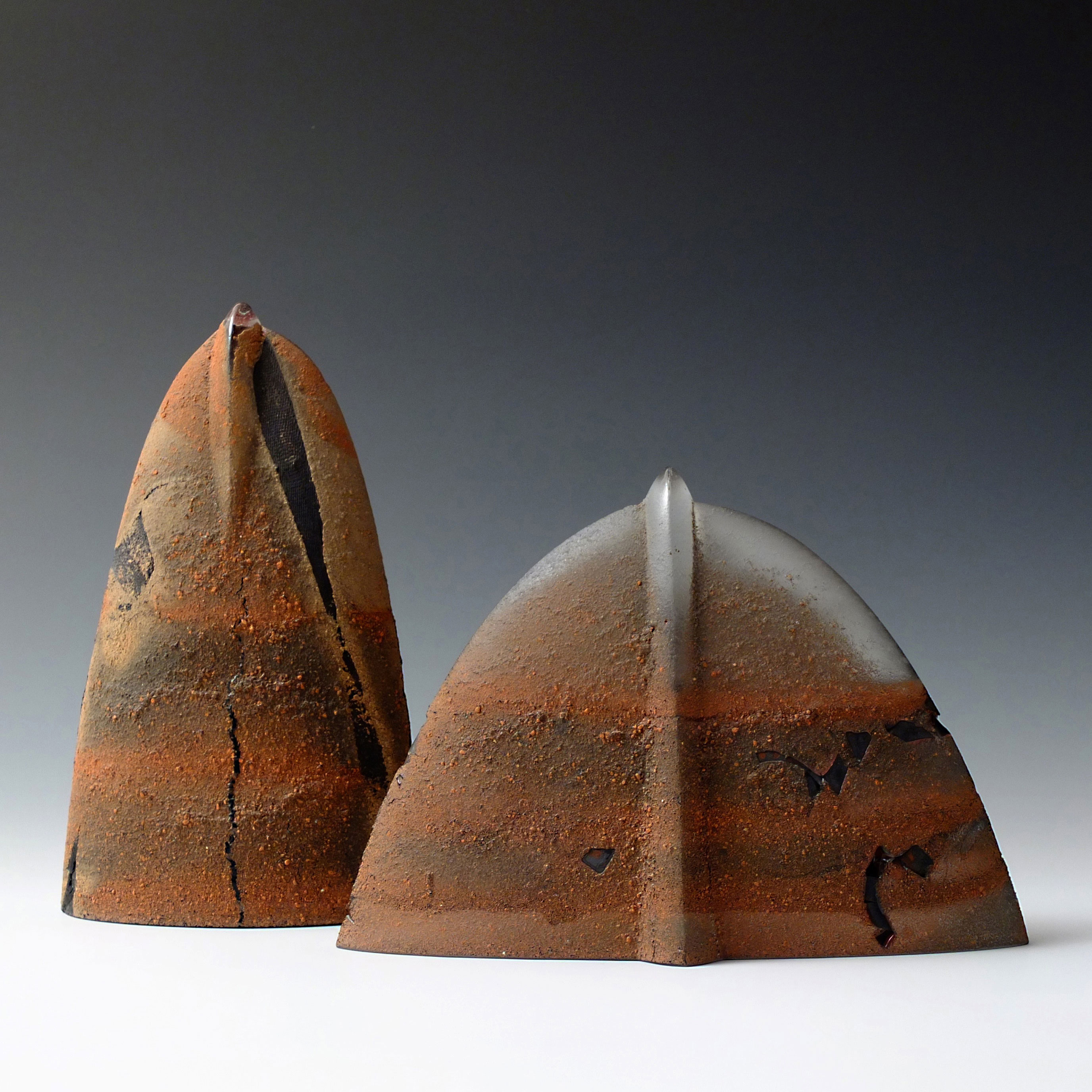 Metall- und Farbeinschlüsse, Größen: 15 x 8 x 26cm, und 27 x 8 x 19cm